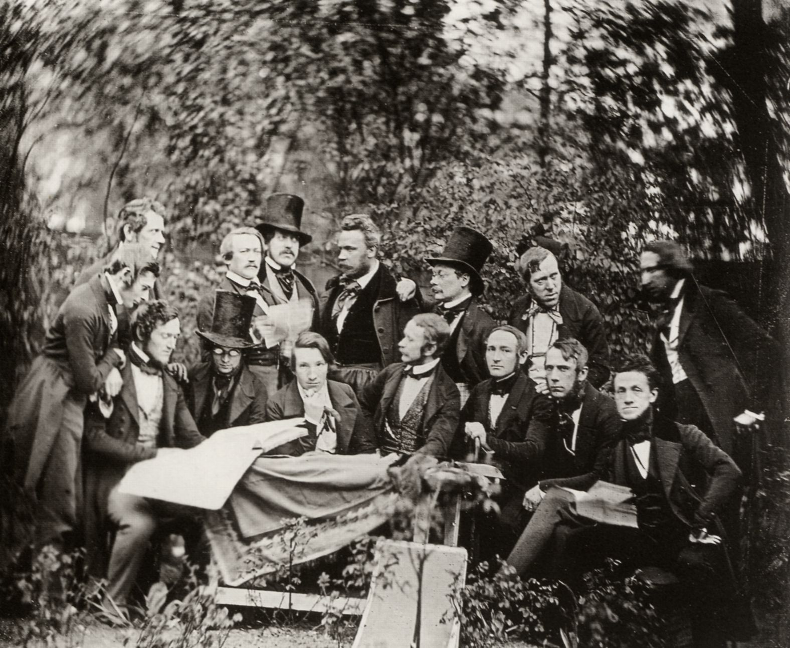 Versammlung des Hamburger Künstlerverein am 6. Mai 1843 im Sommerlocal auf der Caffamacherreihe. Stehend (l.n.r.): Architekt Heylmann, A.F. Vollmer, Otto Speckter, Martin Gensler, Architekt Bülau, Architekt Kollmann, Günther Gensler, J.H. Sander. Sitzend (l.n.r.): C.M. Laeisz, W.F. Wulff, J.L.W. Westermann, Jacob Gensler, Heinrich Stuhlmann, Georg Haeselich, J.W.D. Bantelmann.